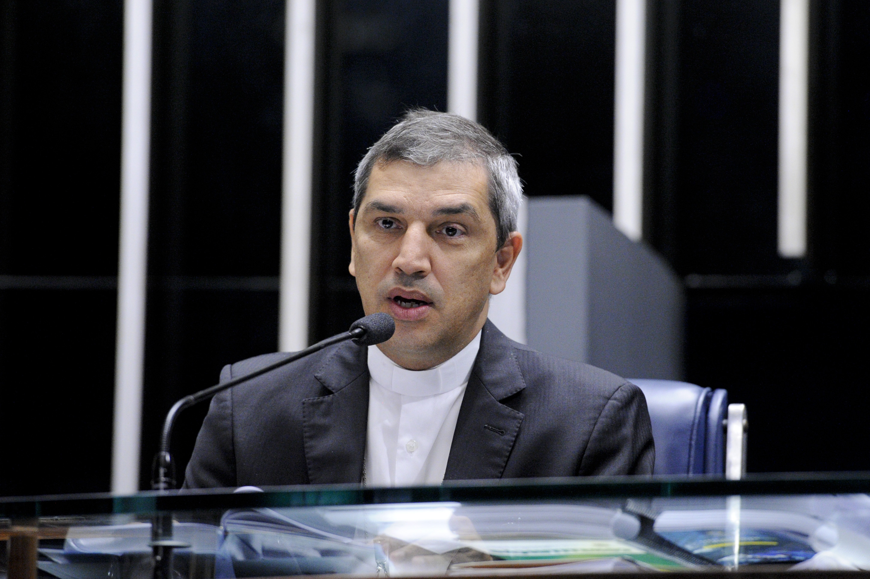 Plenário do Senado Federal durante sessão especial destinada a celebrar o lançamento da Campanha da Fraternidade de 2017. O tema da campanha de 2017 é "Fraternidade: biomas brasileiros e defesa da vida" e o lema "Cultivar e guardar a criação". Em pronunciamento, representando o presidente da Conferência Nacional dos Bispos do Brasil (CNBB), o Reverendíssimo Senhor Dom Marcony Vinícius Ferreira. Foto: Edilson Rodrigues/Agência Senado